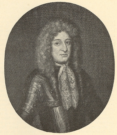 Ludwig, Markgraf von Brandenburg (1666-1687)